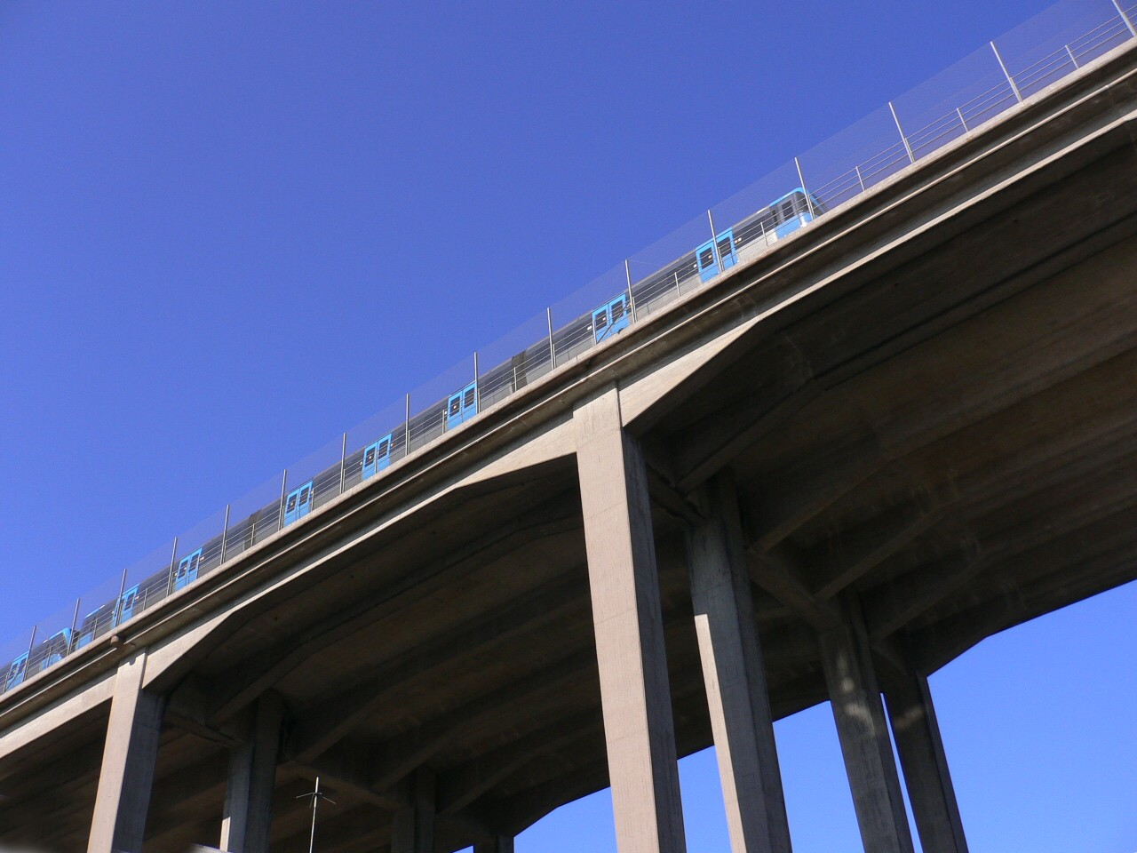 Skanstullsbron, Stockholm.